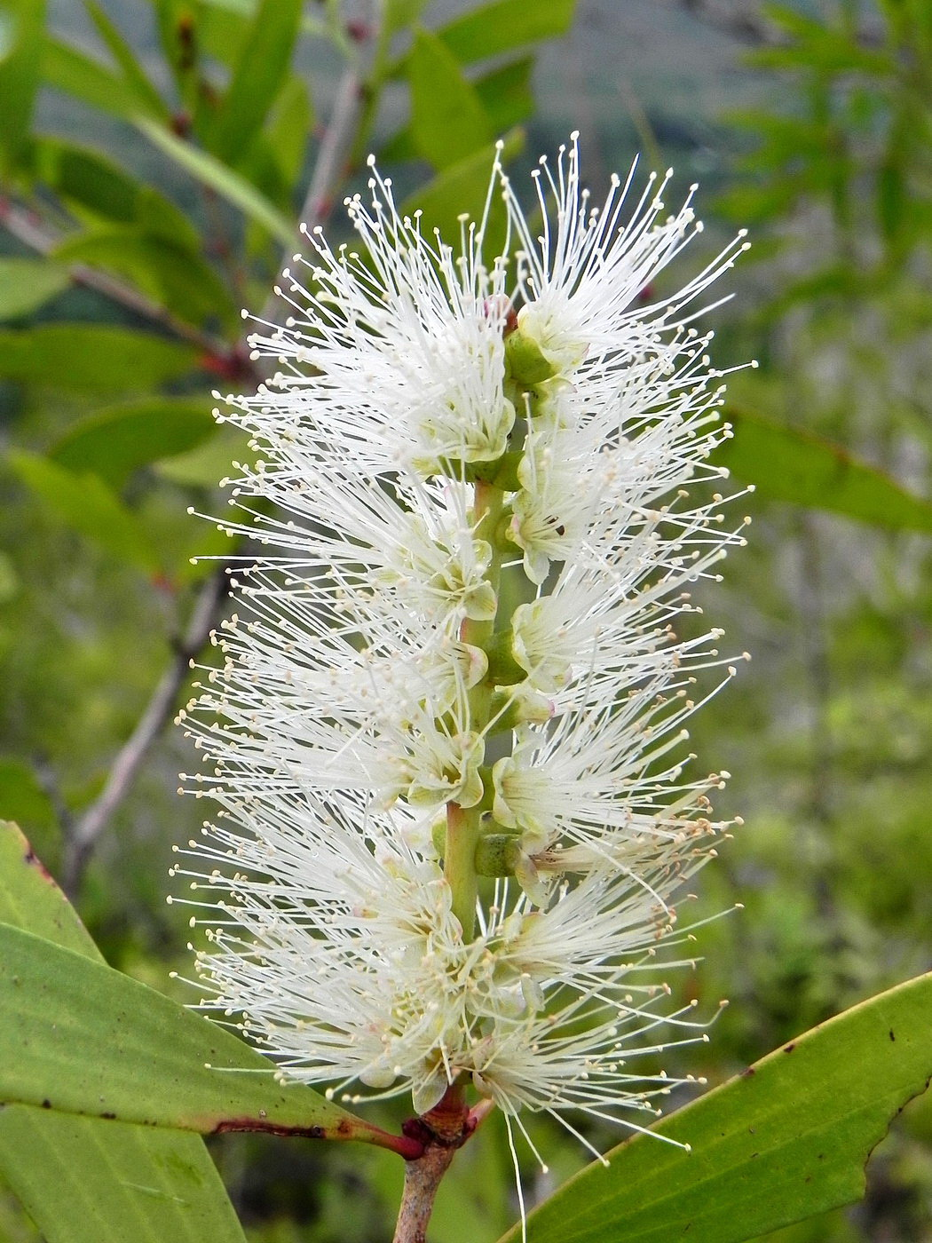 Melaleuca quinquenervia en Nouvelle-Calédonie